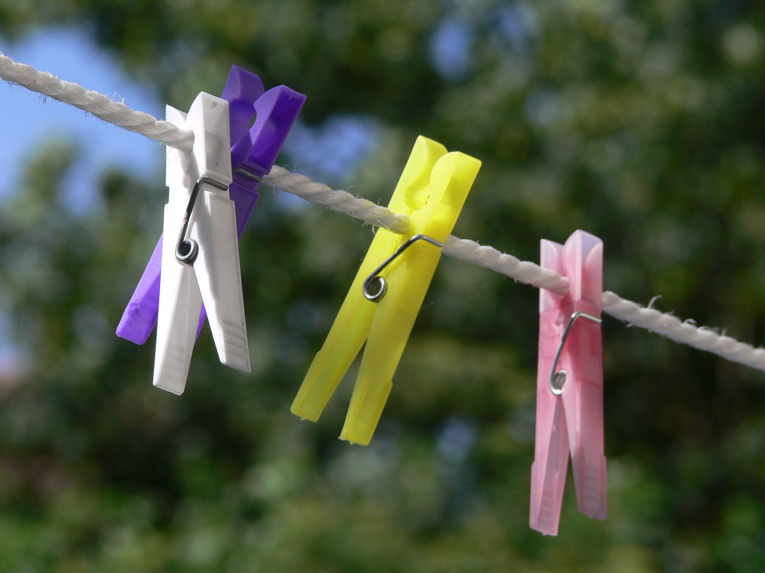 Stilleben